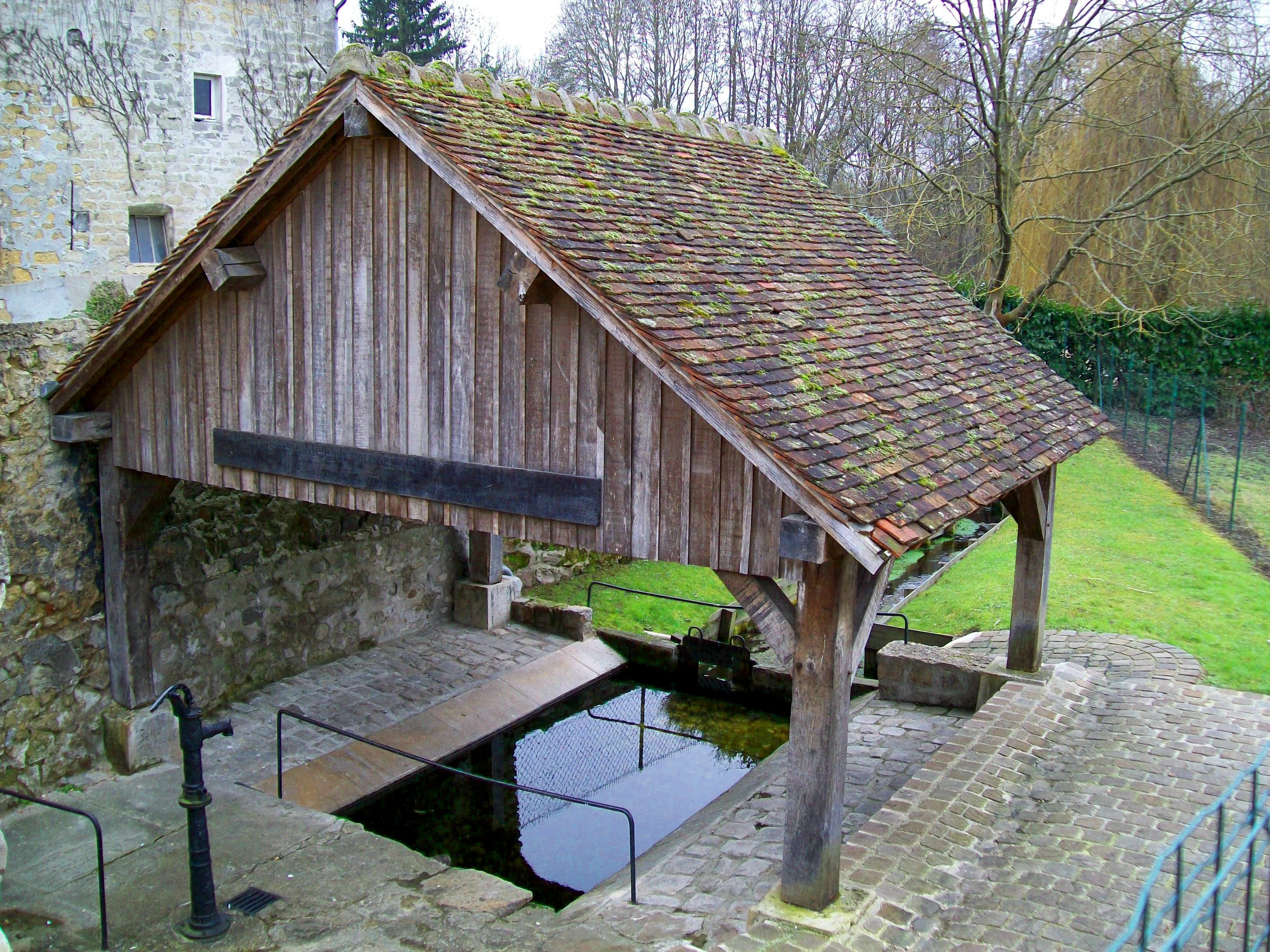 Lavoir de Bellefontaine (95). Le panneau horizontal en bois porte l'inscription: Il est expressément défendu sous peine D'AMENDE de déposer du linge sur le banc de la fontaine à boire ni de laver une chose susceptible de troubler l'eau.